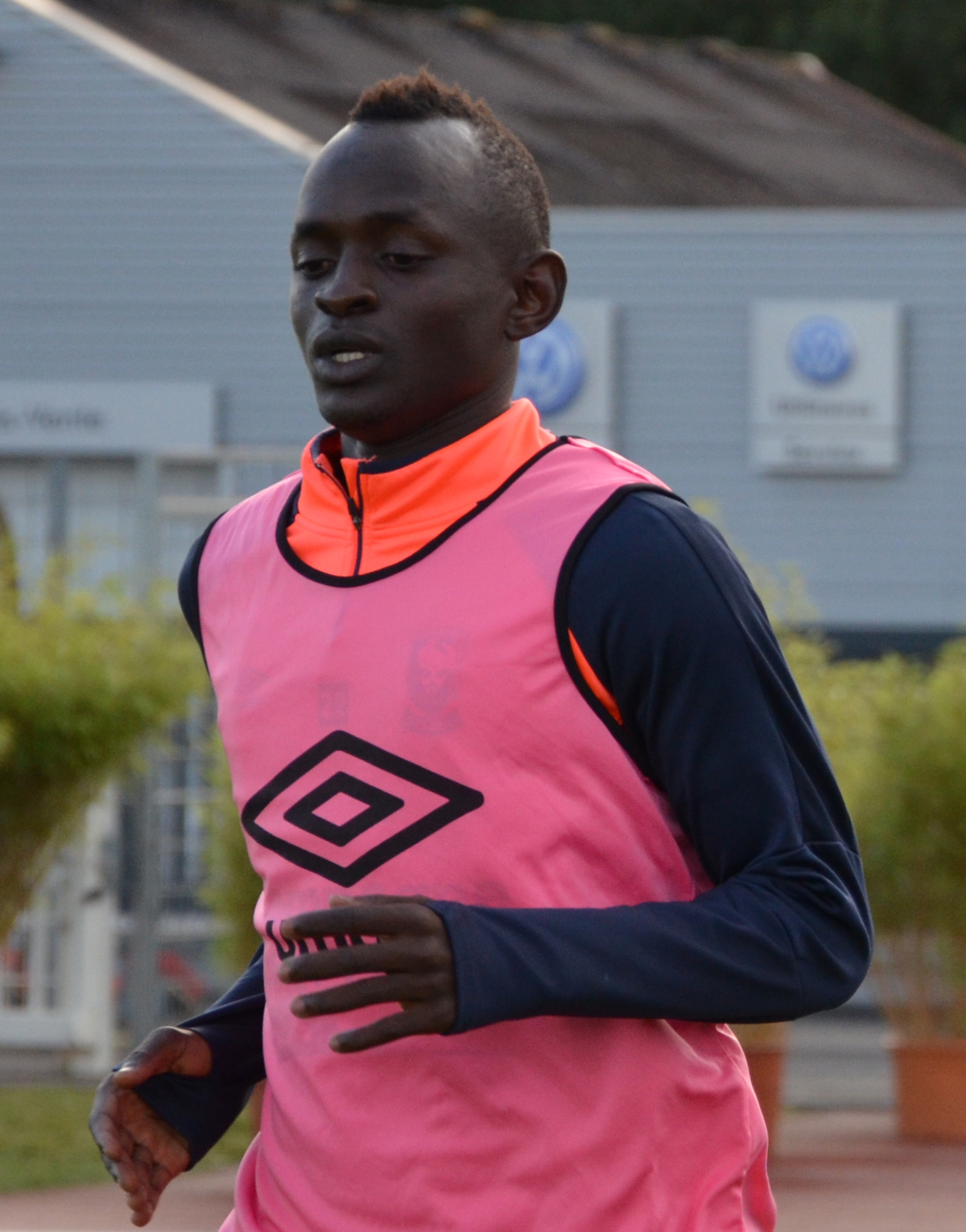 Photographie prise lors du match opposant le Stade rennais au SM Caen en match amical au stade Pierre-Compte de Vire le 22 juillet 2017. Ici, Adama Mbengue.